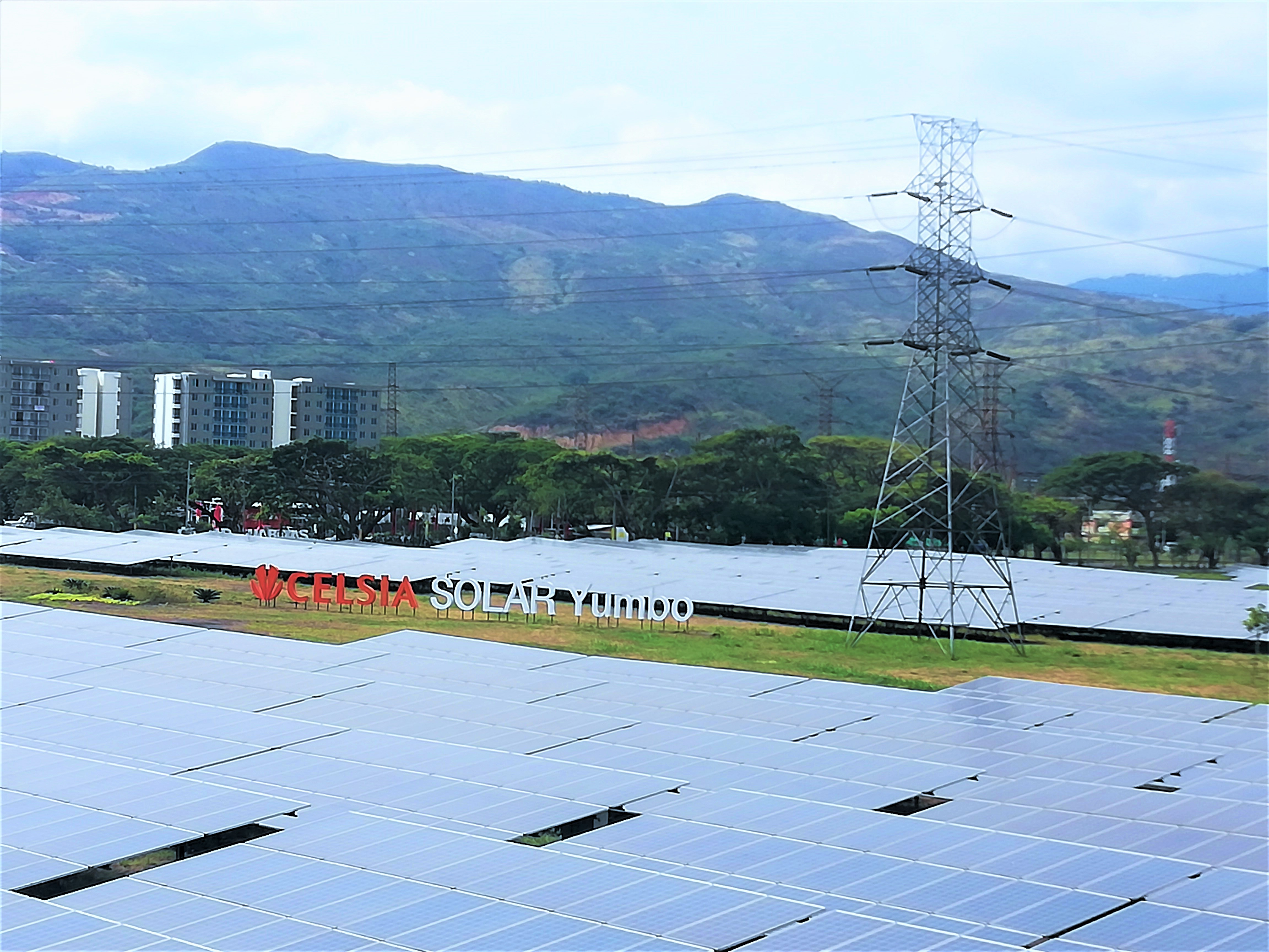 Planta solar de 9,9 MW propiedad de CELSIA y ubicada en Yumbo